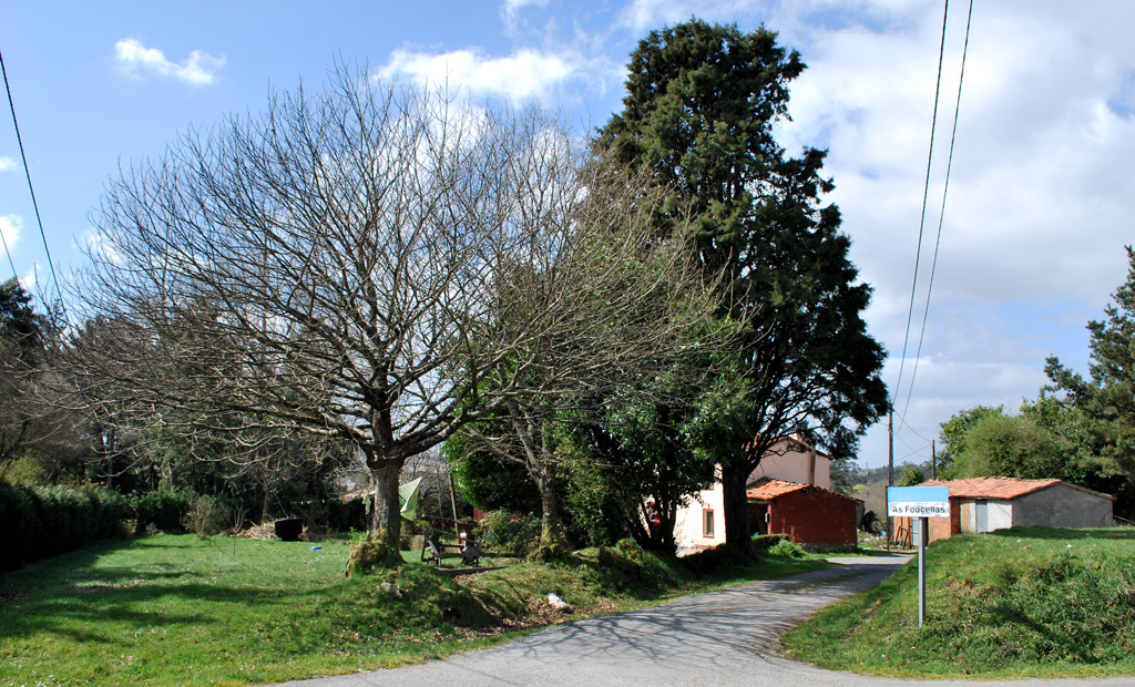 Vista das Foucellas Cabrui en Mesia A Coruña